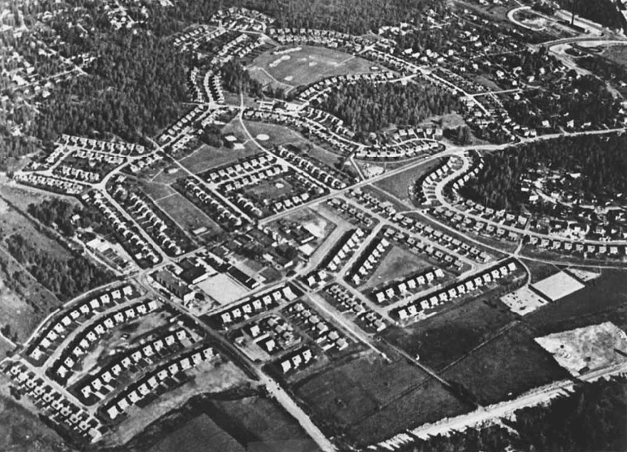 Flygfoto över Ella gårds småhusbebyggelse.